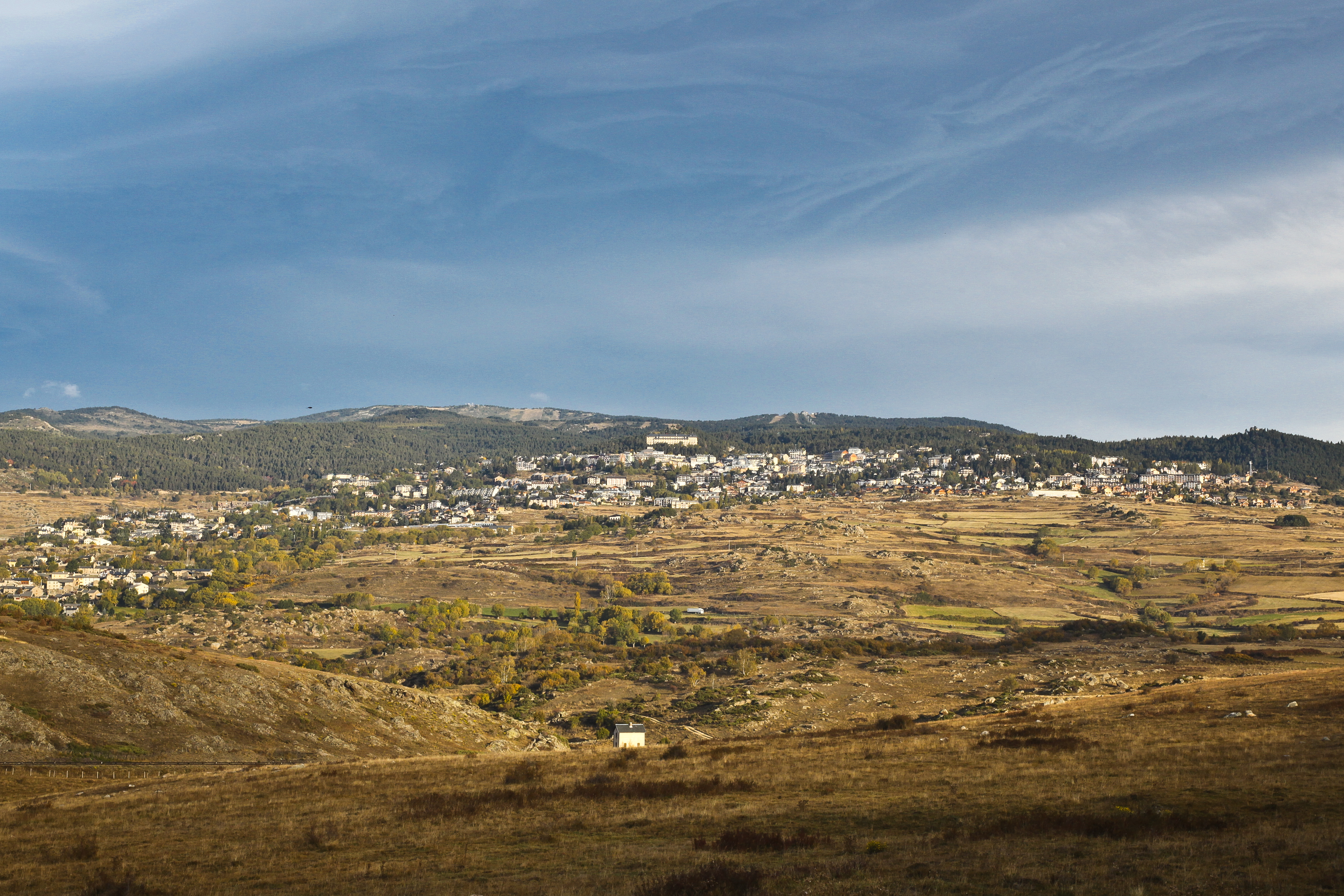 Ville de Font-Romeu